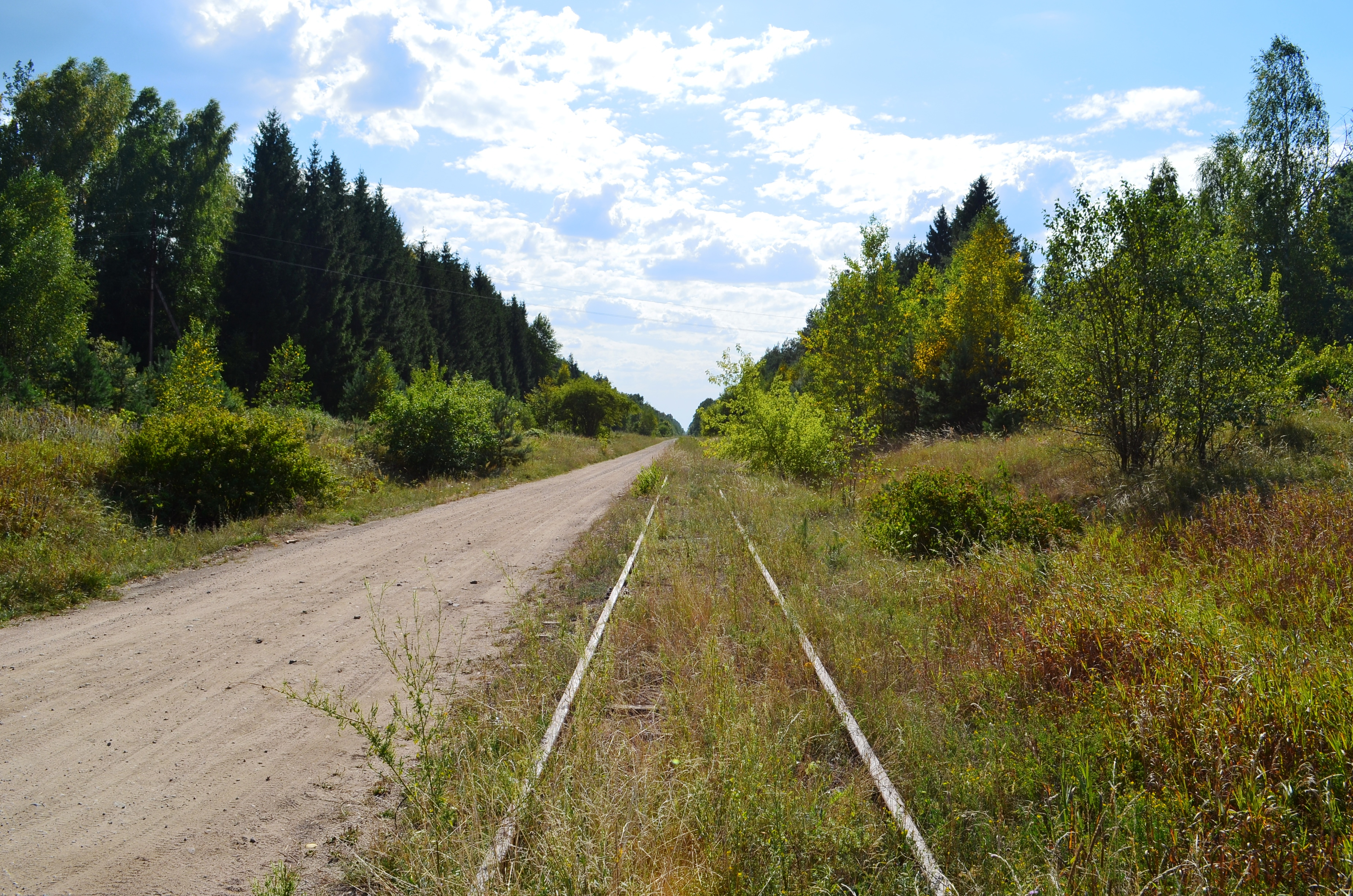 Istorinis geležinkelis Peterburgas-Varšuva Kabelių apylinkėse